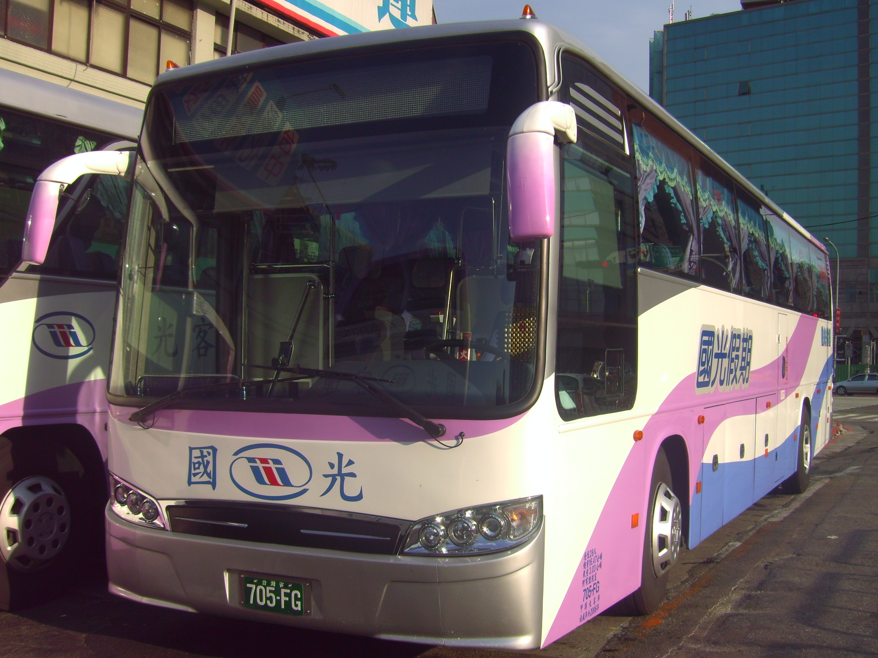 KingBus Co., Ltd. BH120T bus. (705FG, "Kaohsiung - Taipei" Line.)